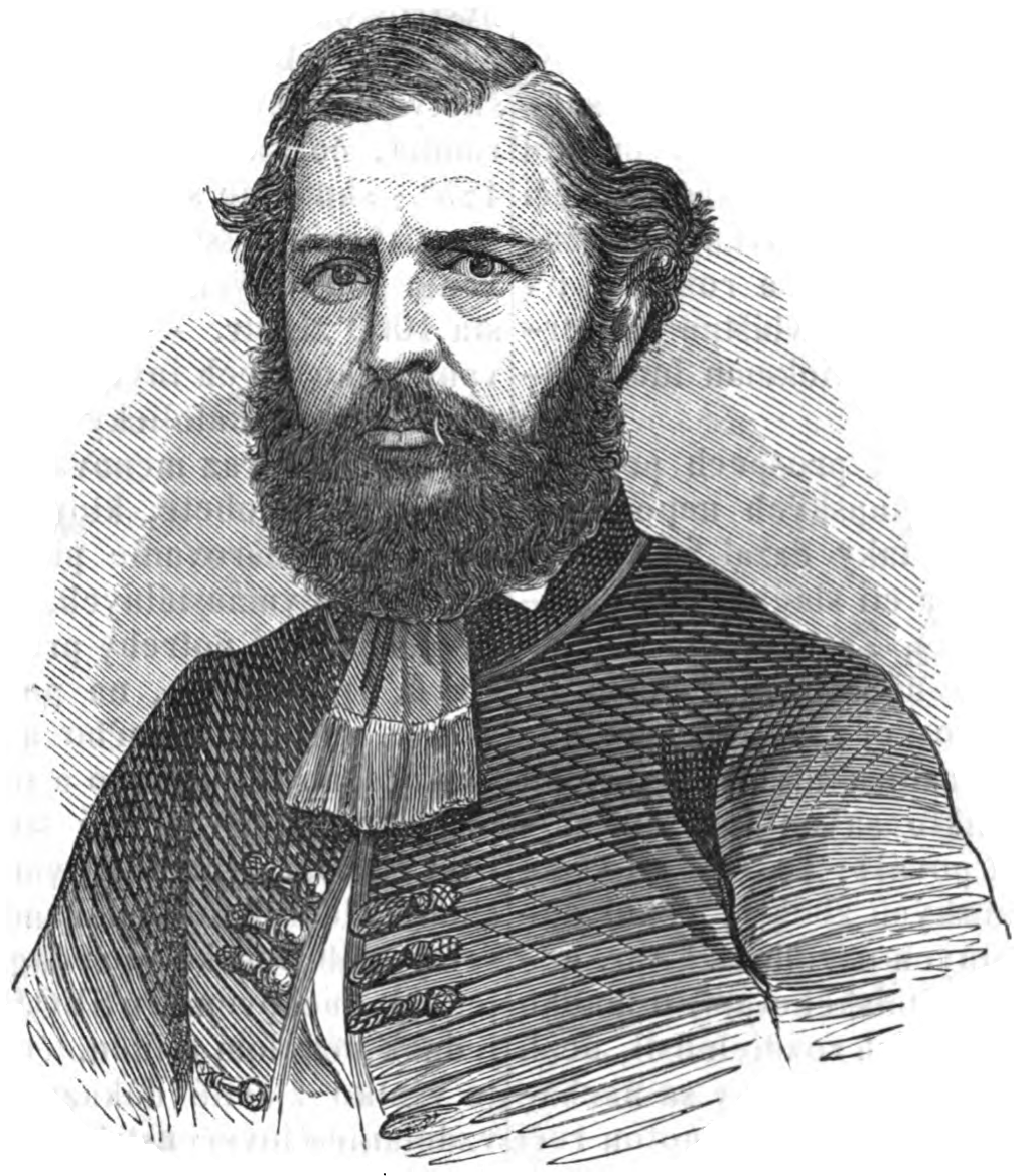 Ján Francisci-Rimavský (1822 - 1905), slovenský básnik, prozaik, prekladateľ, publicista a politik